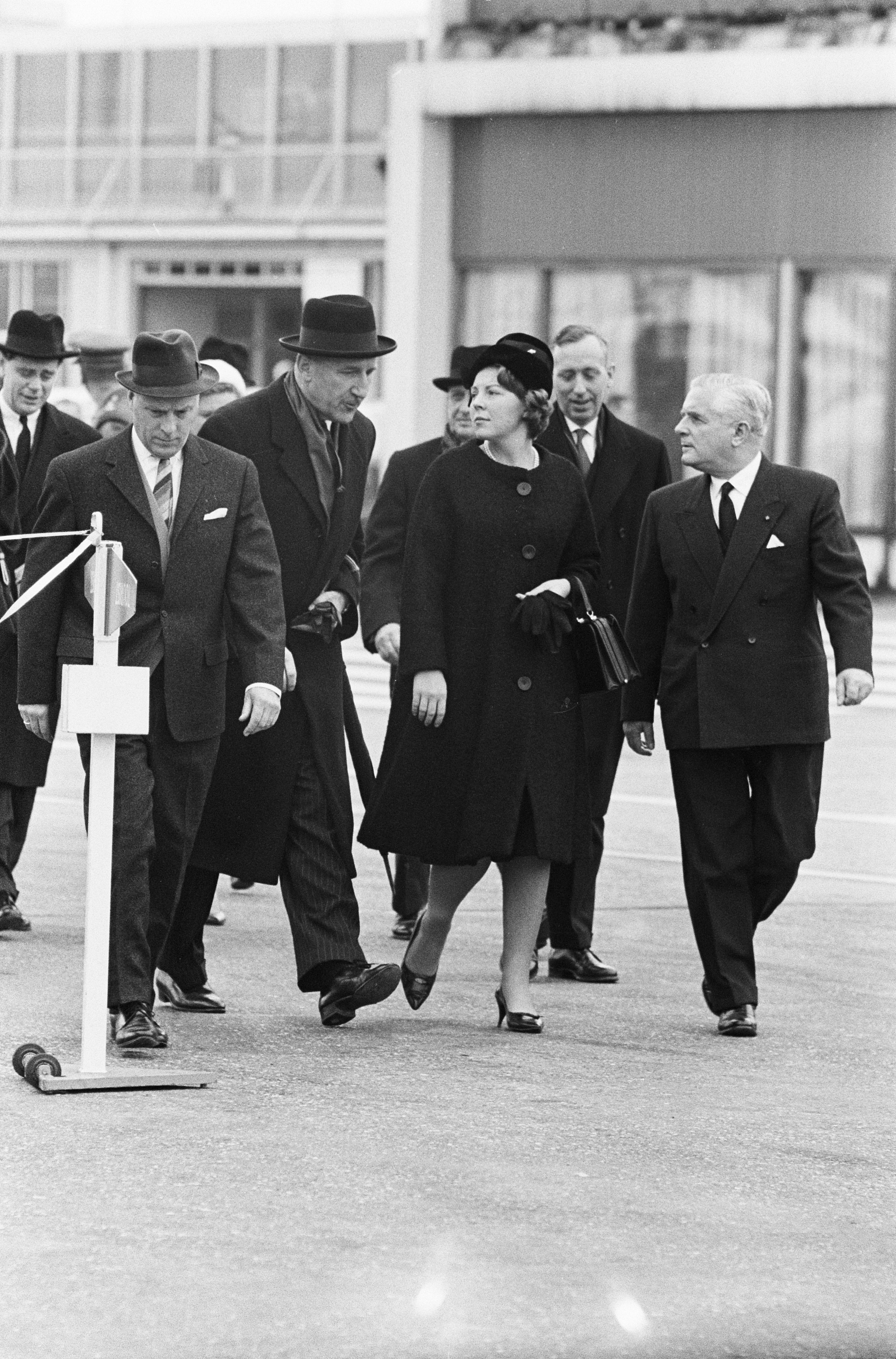 Collectie / Archief : Fotocollectie Anefo Reportage / Serie : [ onbekend ] Beschrijving : Prinses Beatrix en minister Luns naar Amerika vertrokken. Minister Luns op weg naar het vliegtuig rechts direkteur KLM dhr. van der Wal / Datum : 24 november 1963 Locatie : Amerika Trefwoorden : ministers, prinsessen, vliegtuigen Persoonsnaam : Beatrix, prinses, Luns, J.A.M.H., Luns, Joseph Fotograaf : Pot, Harry / Anefo Auteursrechthebbende : Nationaal Archief Materiaalsoort : Negatief (zwart/wit) Nummer archiefinventaris : bekijk toegang 2.24.01.05 Bestanddeelnummer : 915-7736